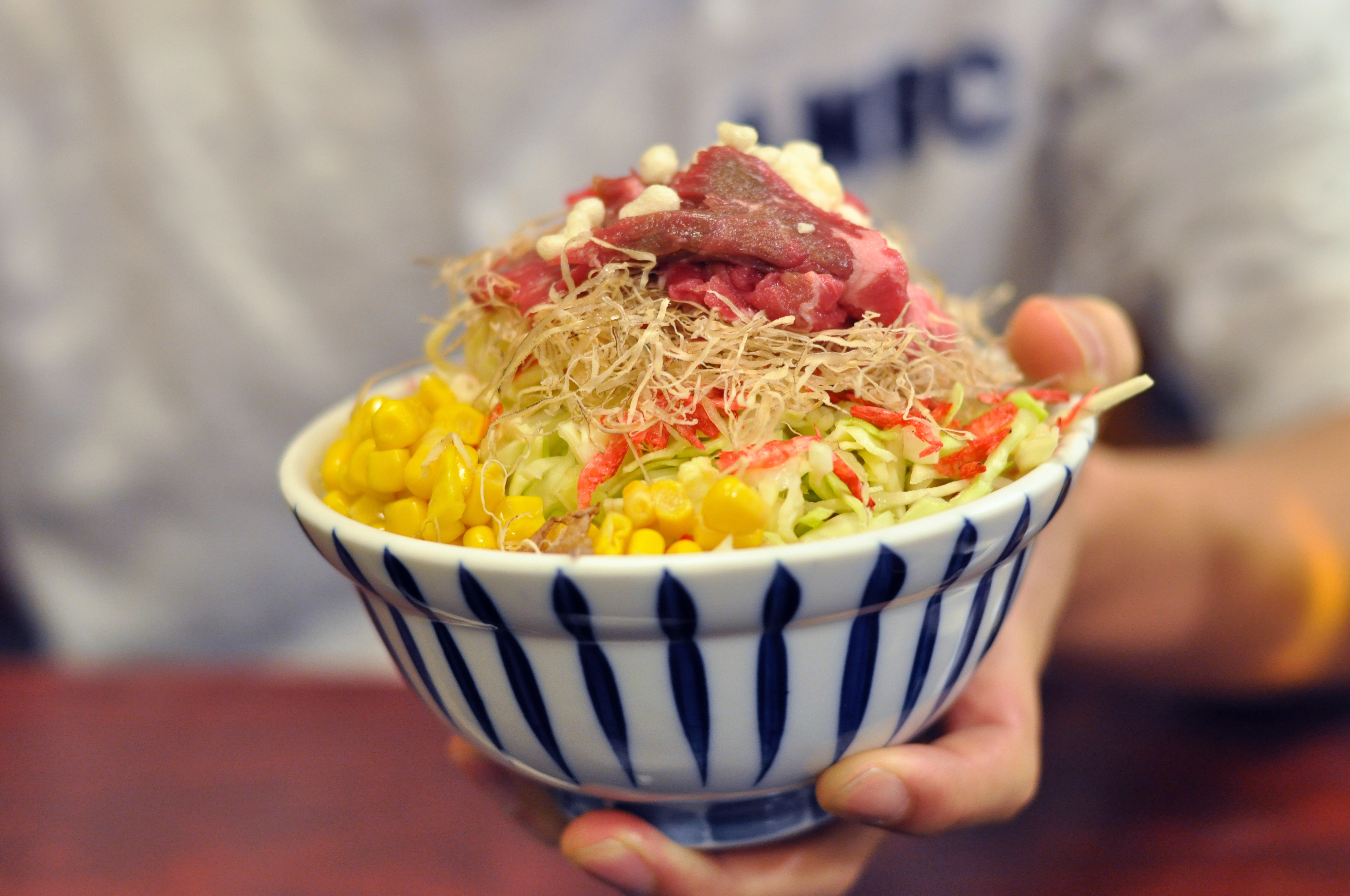 焼く前のもんじゃ焼き